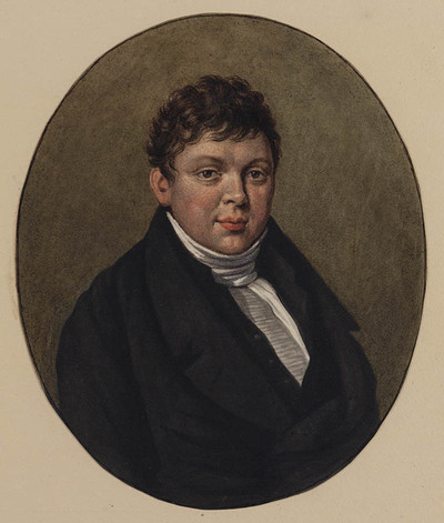 Portret van Vincent Loosjes (1786-1841) door Gerrit Jan Michaëlis (1775-1857)